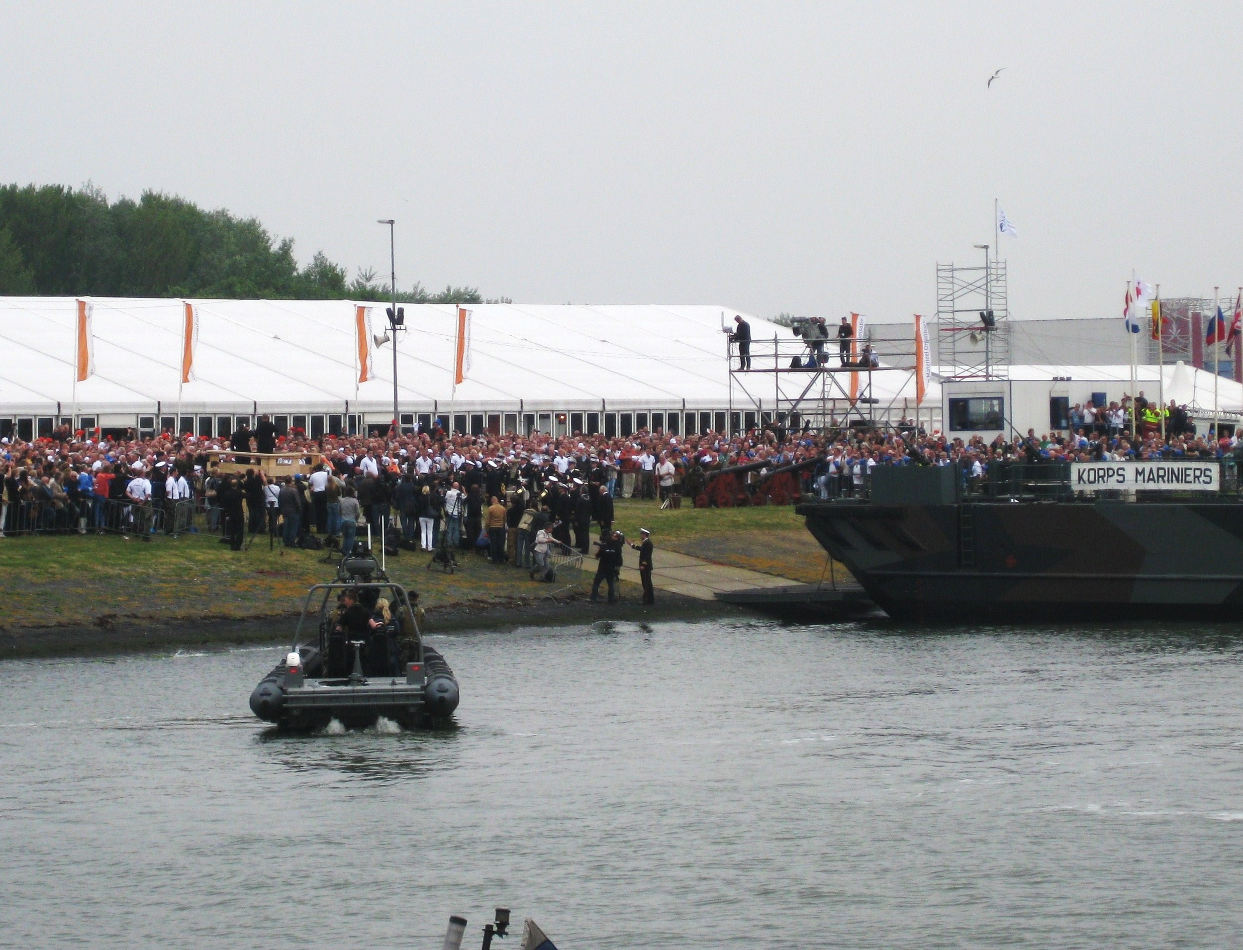 Saamhorigheidsdag voor Marinepersoneel tijdens de Marinedagen 2013 in Den Helder